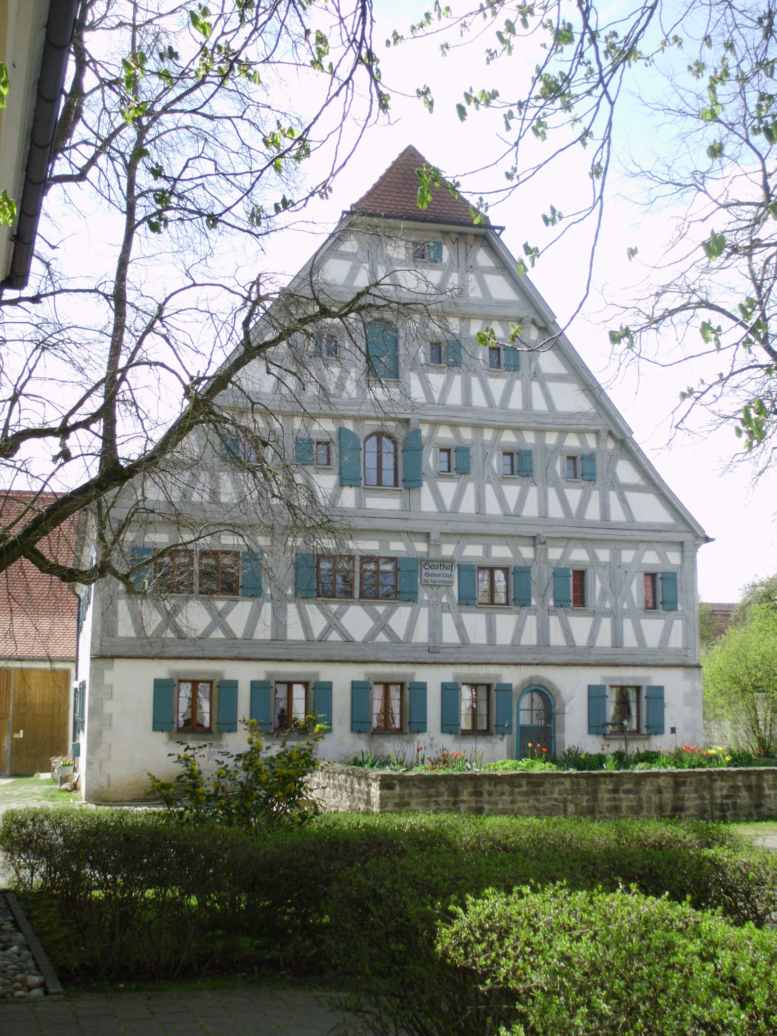 Sausenhofen, Ortsteil von Dittenheim in mittelfränkischen Landkreis Weißenburg-Gunzenhausen (Bayern), historischer Gasthof an der Kirche